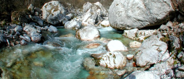 Tolminka v gornjem toku Foto Boštjan Burger, januar 2005